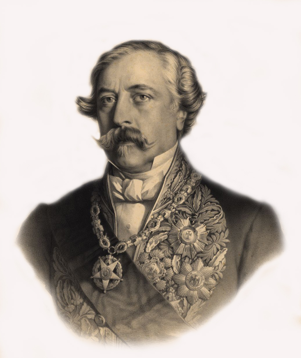 Picture of former Portuguese Prime Minister Nuno José Severo de Mendonça Rolim de Moura Barreto, Duke of Loulé.